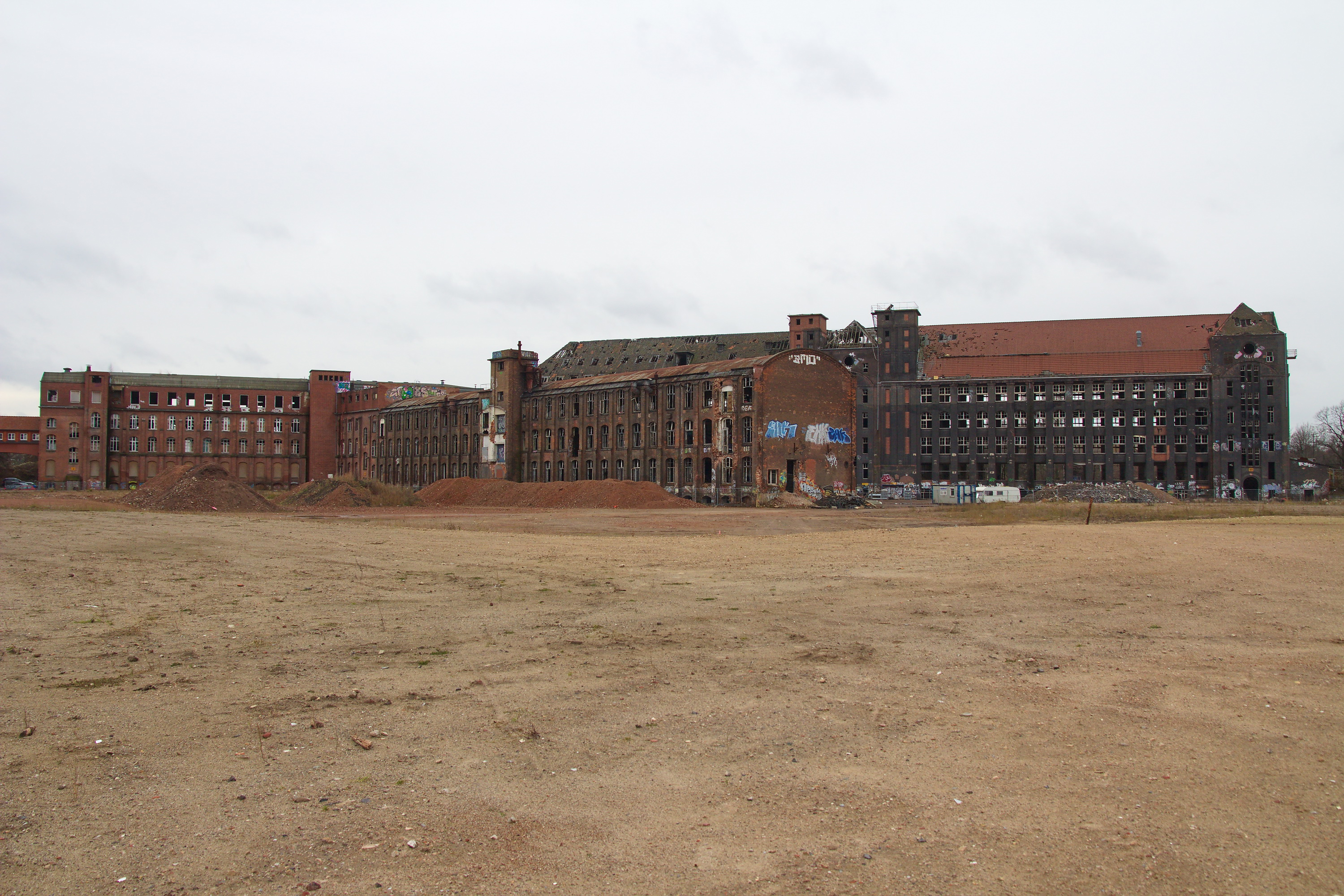 Sanierung des Geländes der ehemaligen Continental AG in Limmer (Hannover), Niedersachsen, Deutschland zwecks Umgestaltung zur Wasserstadt Limmer als Wohngebiet für über 600 Wohneinheiten.